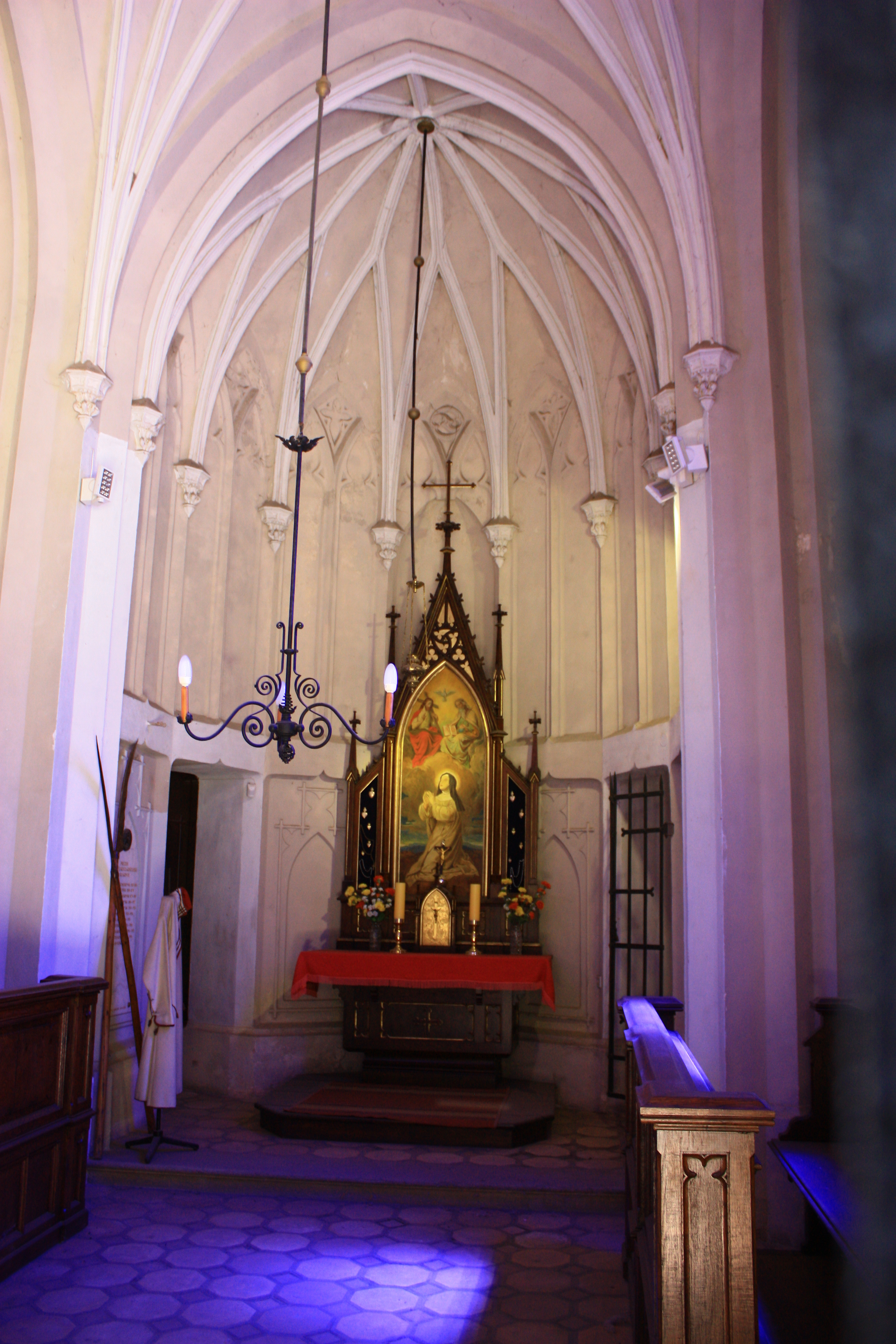 Kraków, kaplica bł. Bronisławy, 1861